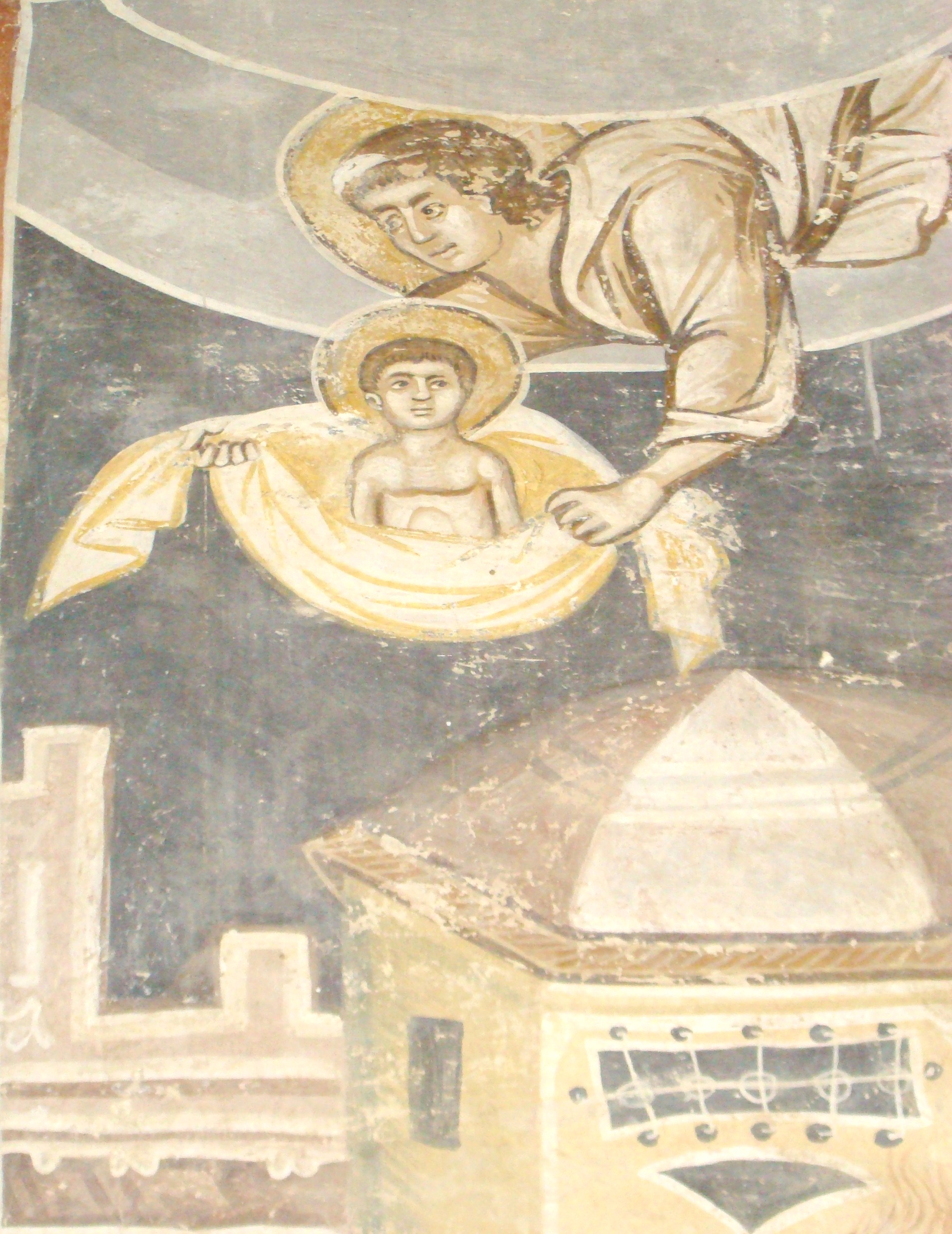 Biserica evanghelică, sat DÂRLOS; comuna DÂRLOS, județul Sibiu